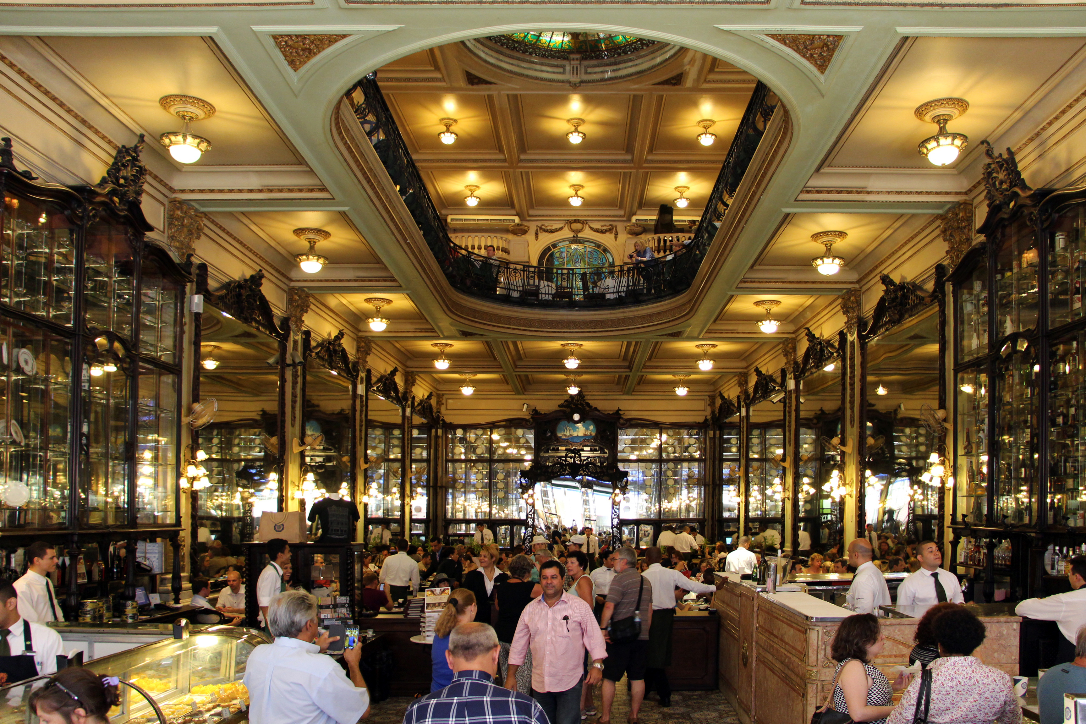 Rio de Janeiro